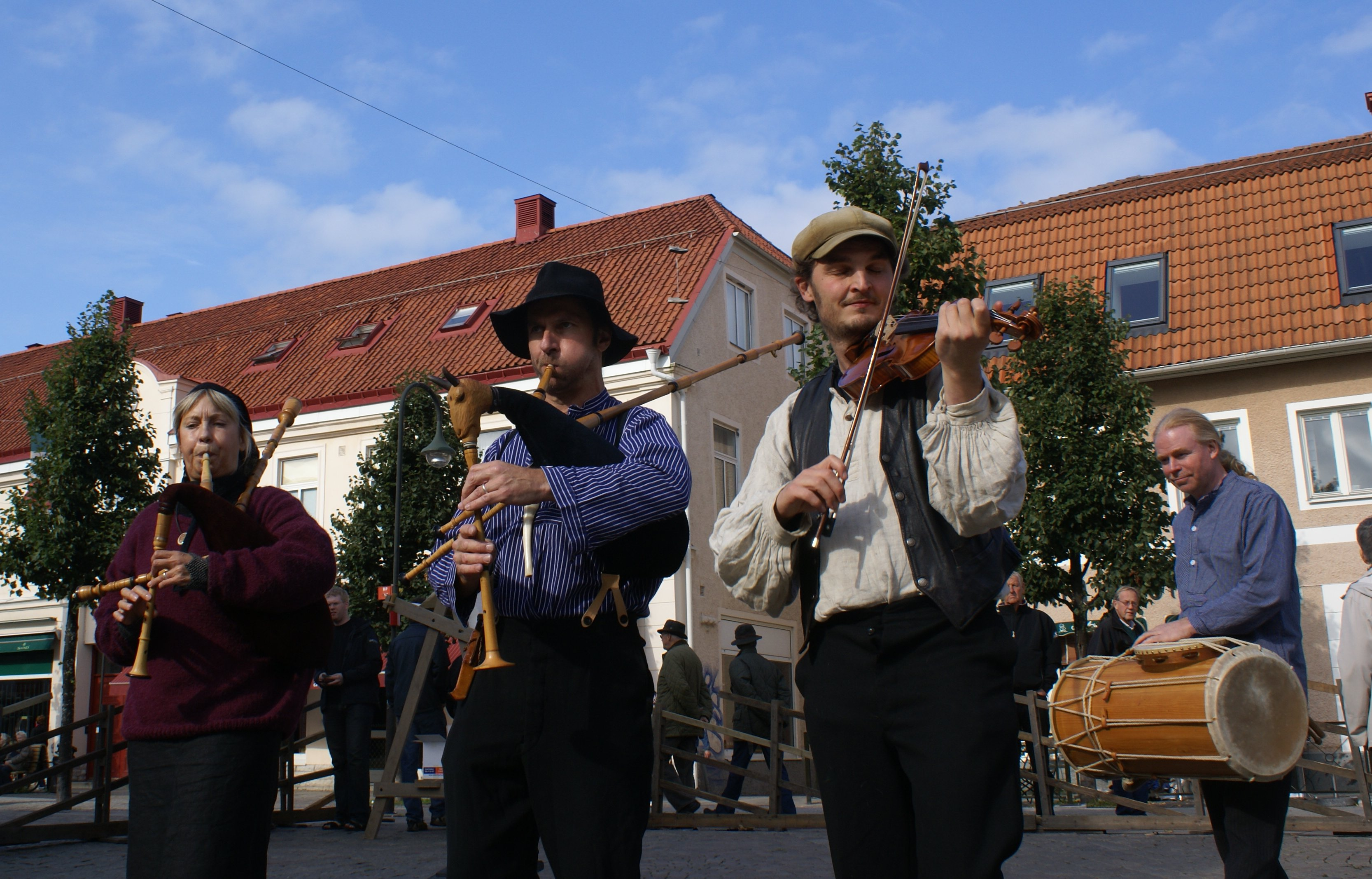 Spielmann.